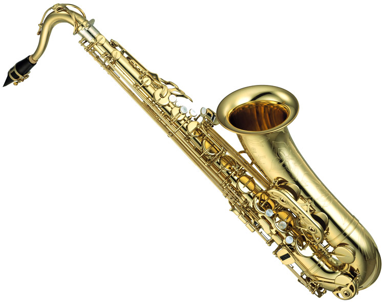 Тенор саксофон